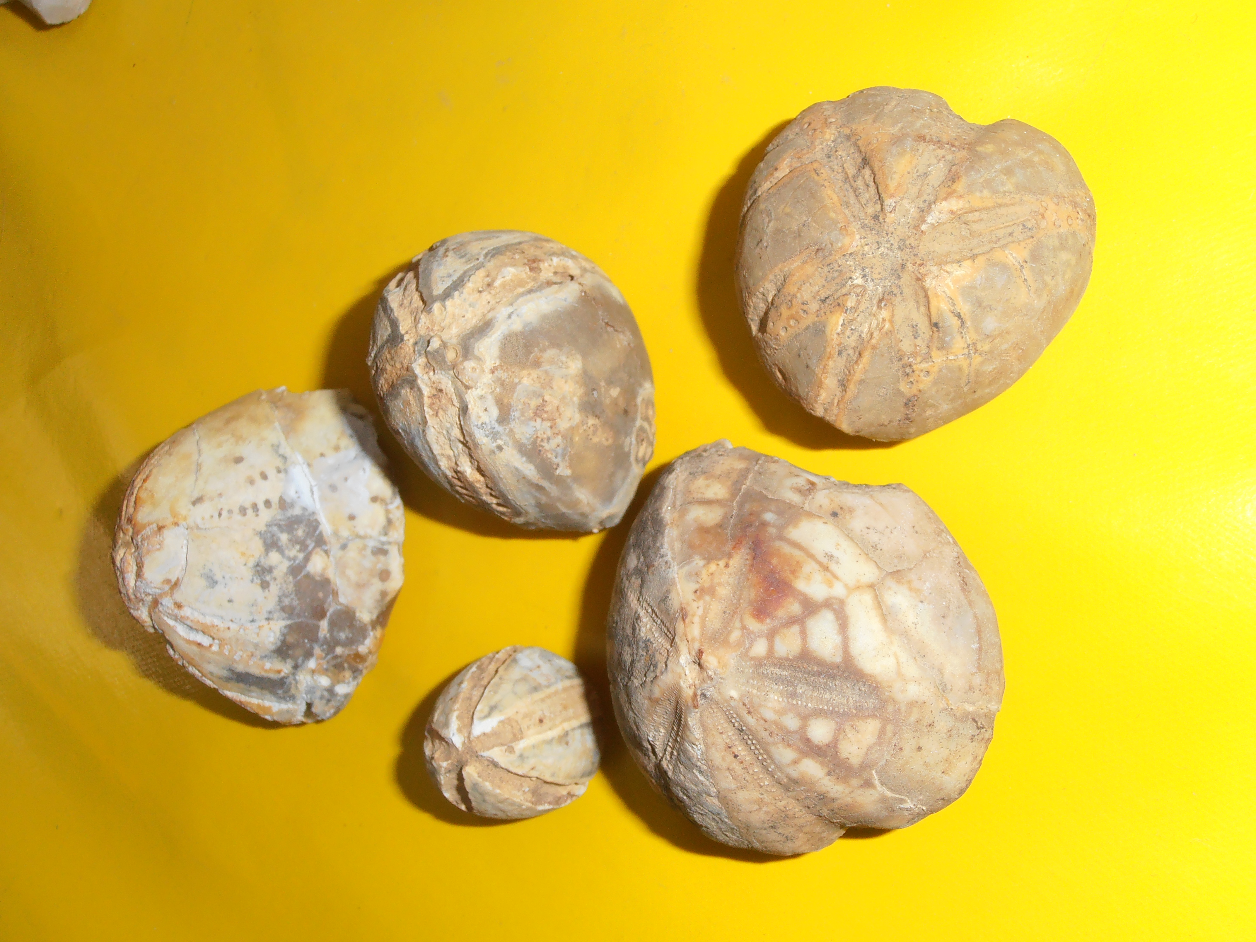 Oursins fossiles de typemicraster trouvs à Saint-Julien du Sault (Yonne) France